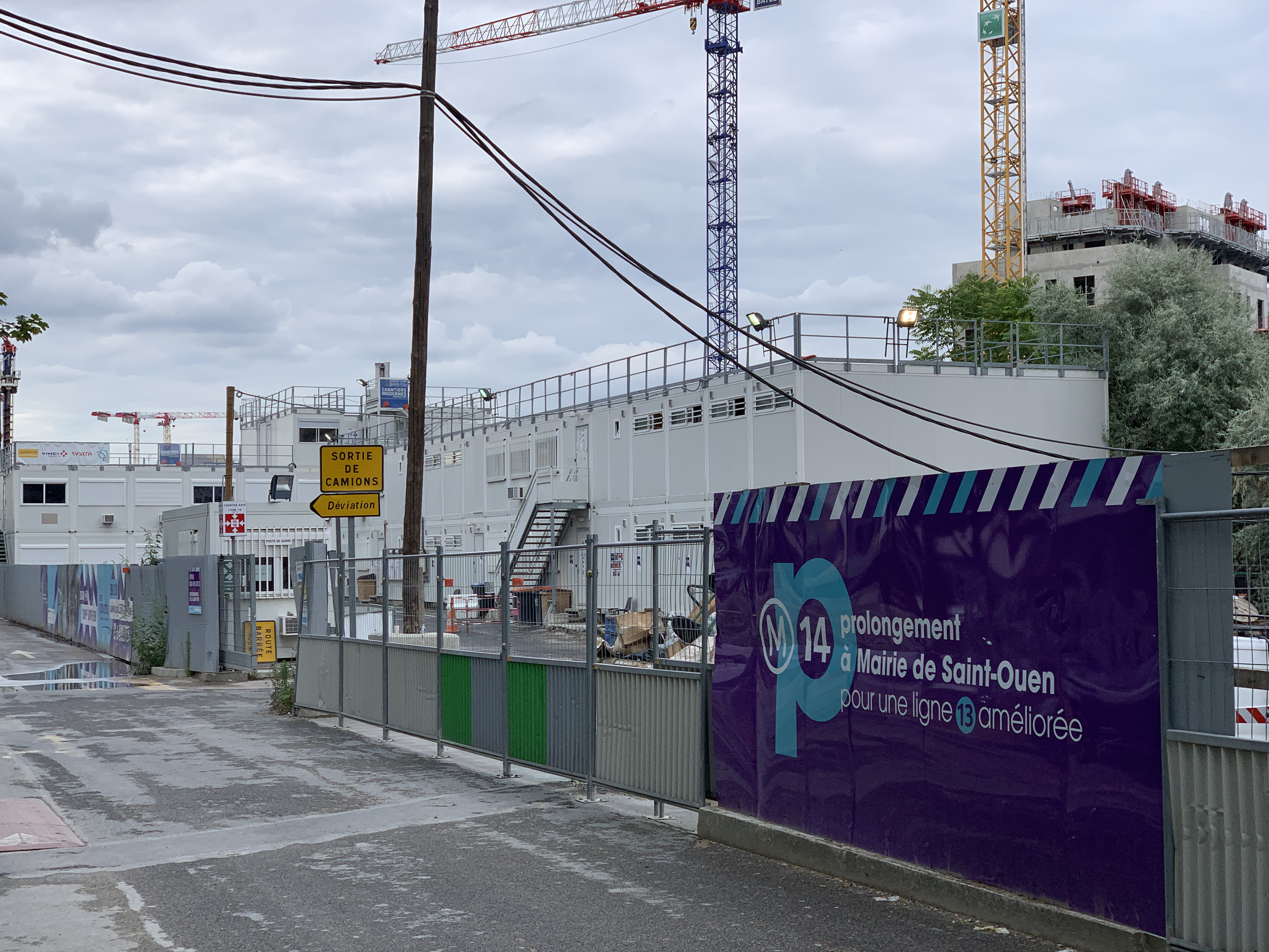 Chantier de la station de métro Saint-Ouen, ligne 14 du métro de Paris, Saint-Ouen-sur-Seine.